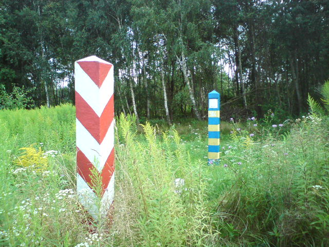 Granica polsko - ukraińska w Żmijowiskach